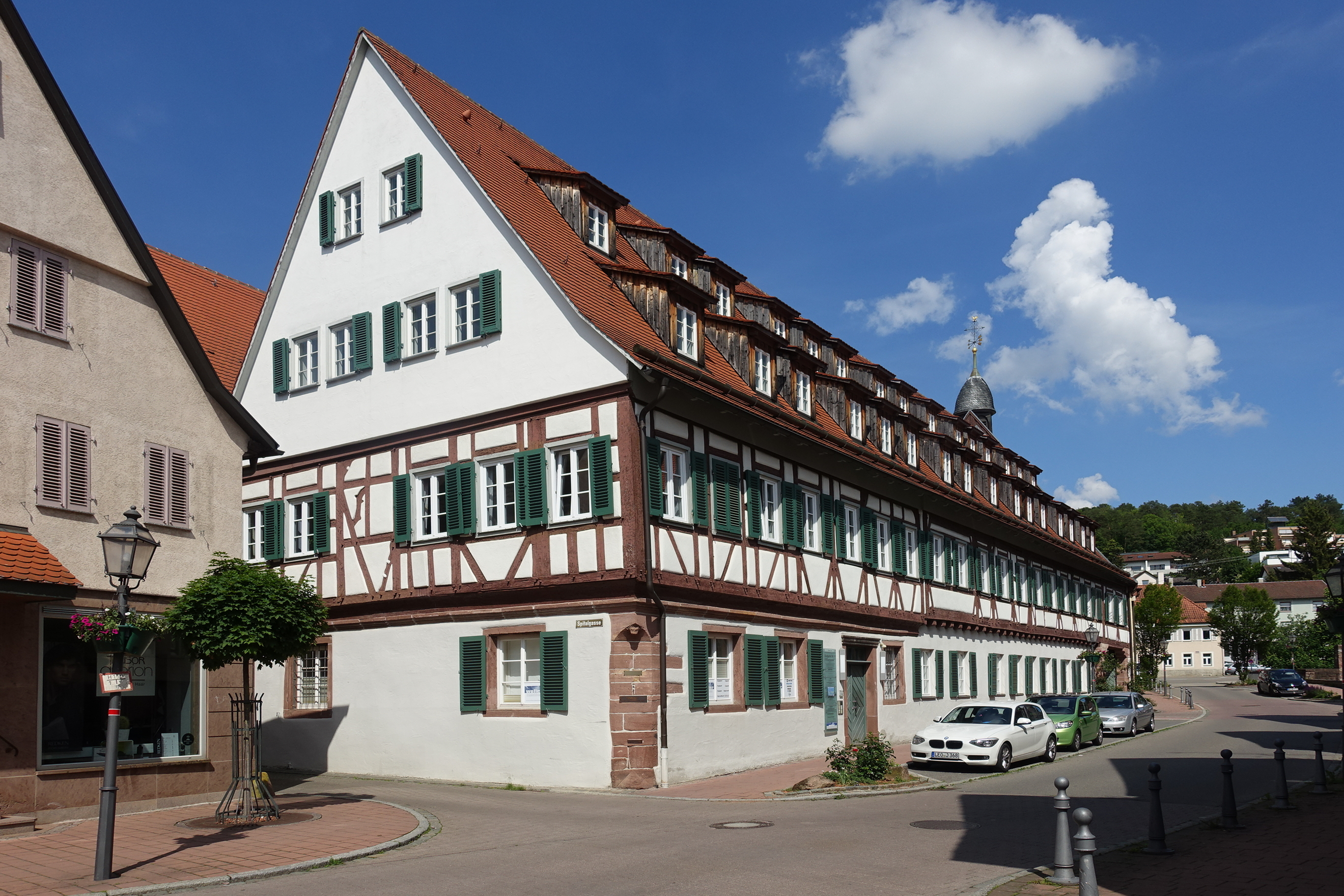 ehemaliges Spitalgebäude